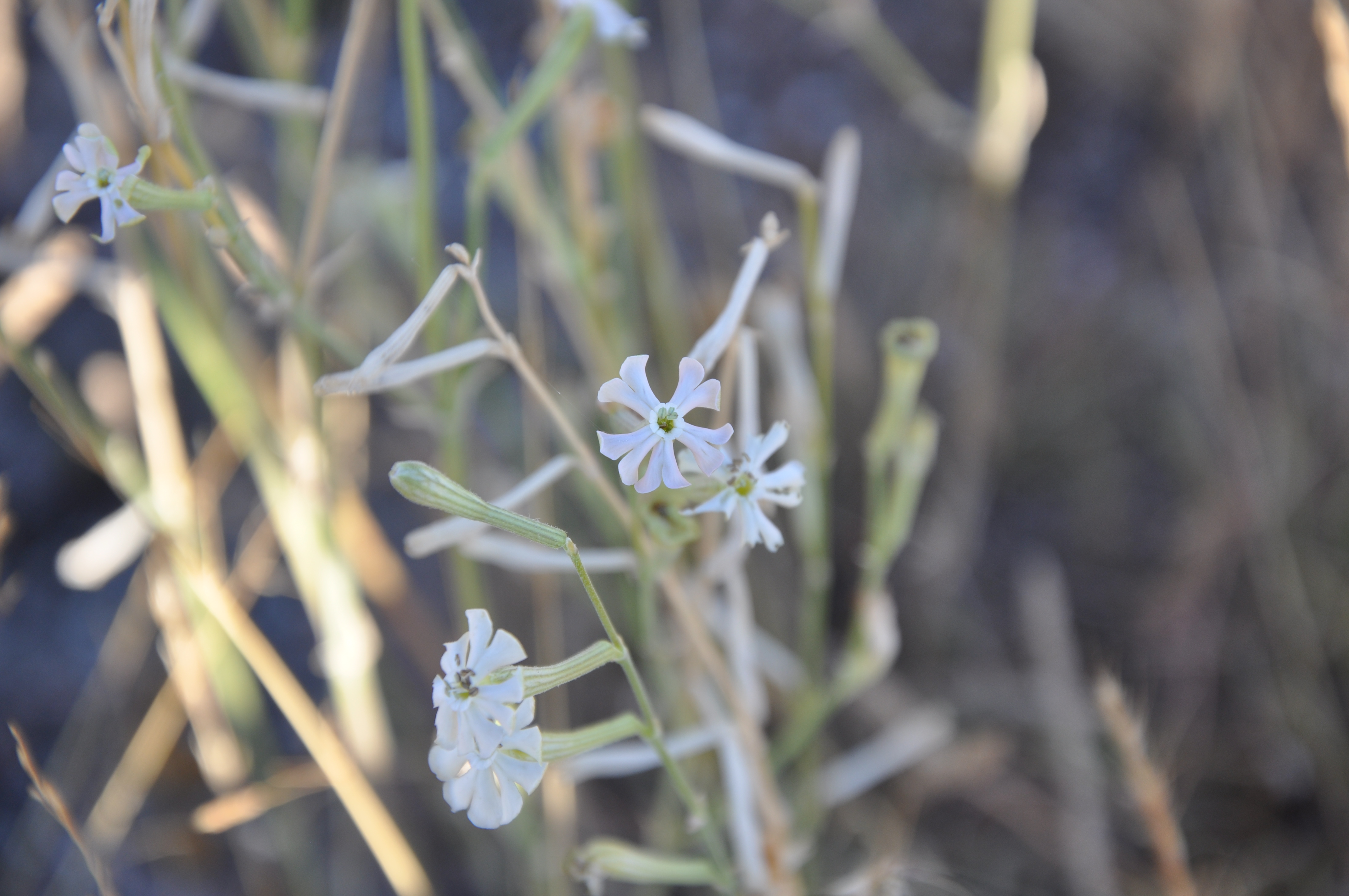 Silene leonesa (Silene legionensis), (La Torre-Ávila), España.